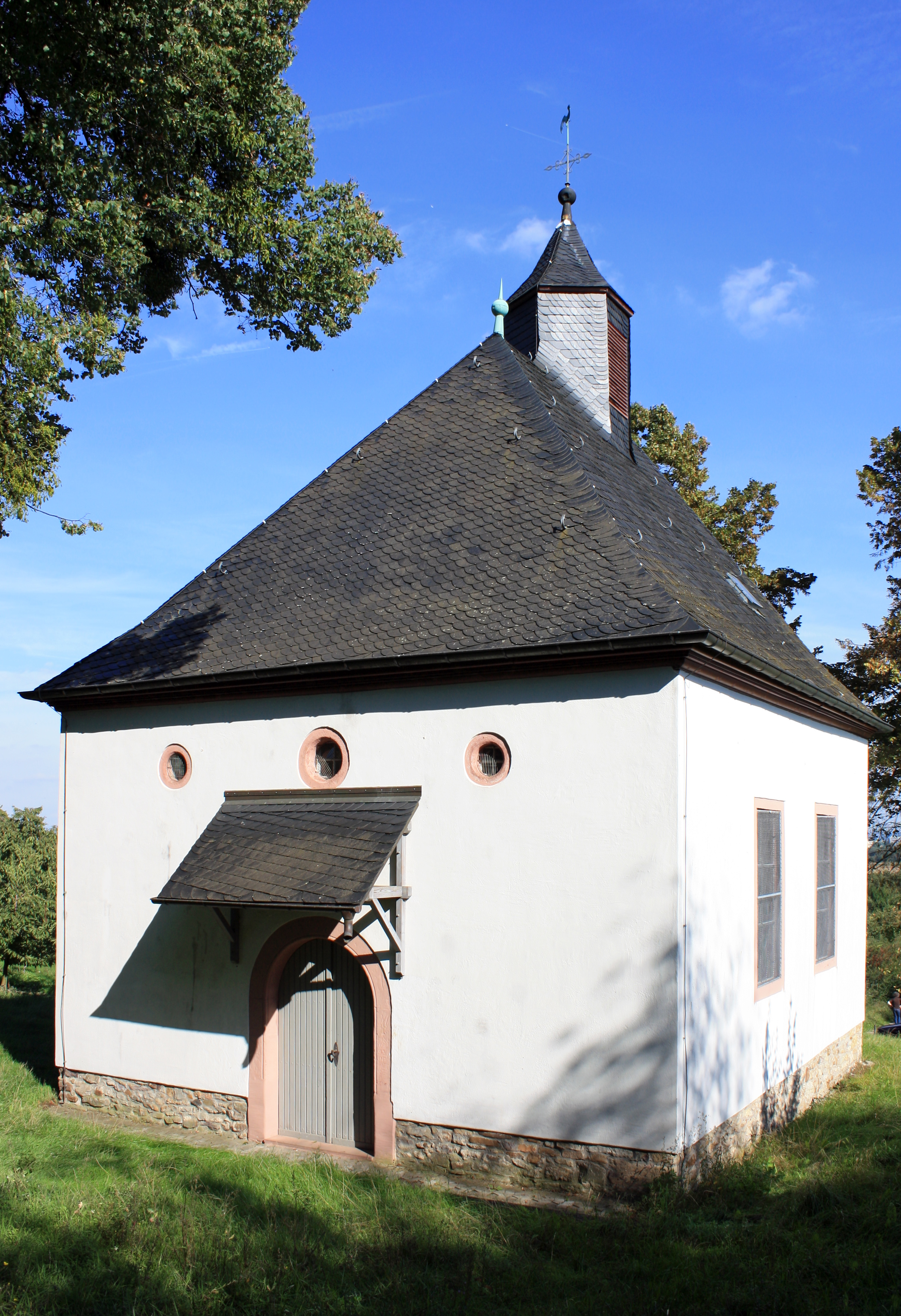 Die "Hollarkapelle" bei Friedberg-Ockstadt. Benannt nach dem ehemaligen, im Dreißigjährigen Krieg zerstörten Dorf Hollar.